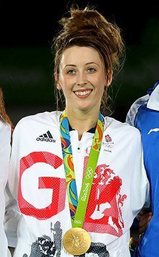 مدال‌آوران وزن 57 کیلوگرم مسابقات تکواندوی المپیک 2016 ریو دو ژانیرو. نفر اول: جید جونز از انگلستان، نفر دوم: اوا گومز از اسپانیا، سوم مشترک: کیمیا علیزاده از ایران و هدایه ملاک وهبه از مصر.